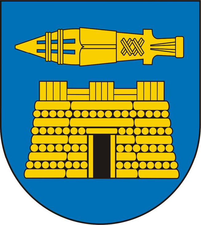 Herb gminy Zgorzelec.